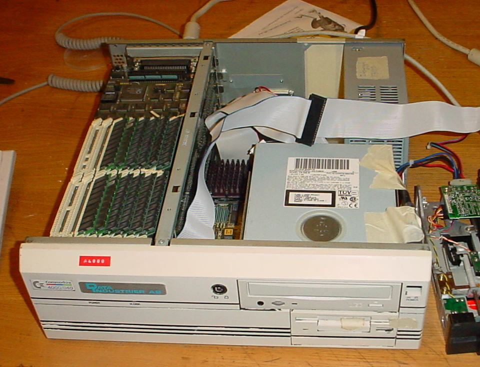 Amiga 4000 genomgår hårdvaruuppgradering